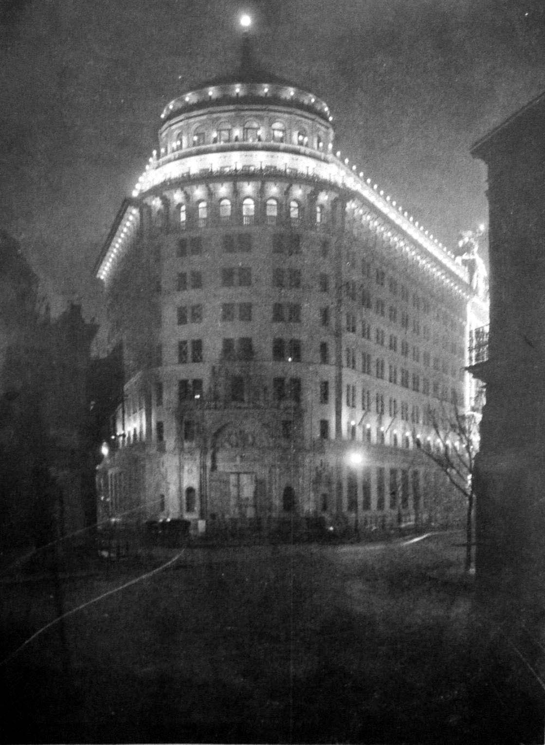 Fachada iluminada del edificio del Banco de Boston (hoy Standard Bank) en el cruce de la Avenida Roque Sáenz Peña y las calles Florida y Bartolomé Mitre. Fue inaugurado en 1924 y proyectado por los arquitectos Chambers & Thomas.